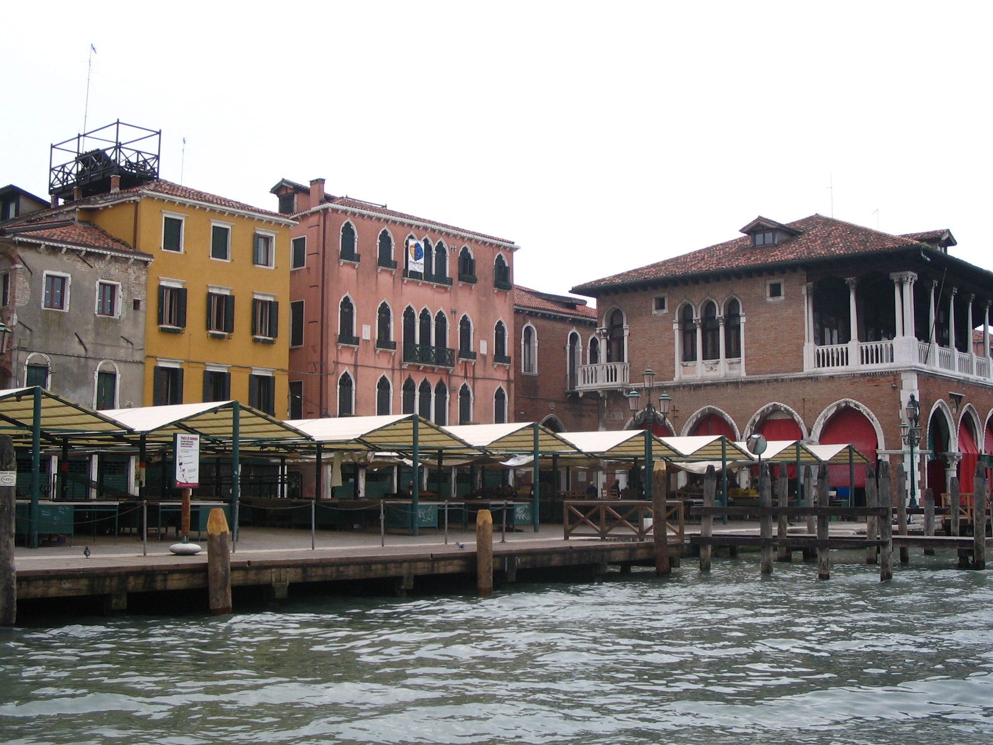 Campo della Pescaria - Grand Canal - Venise